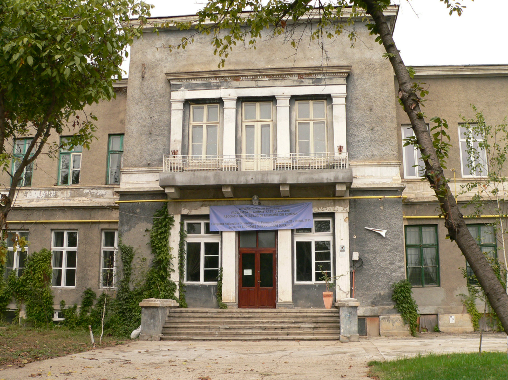 Azilul Elena Doamna, plan îndepărtat